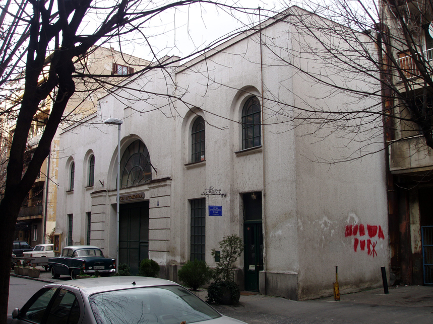 Muzej automobila